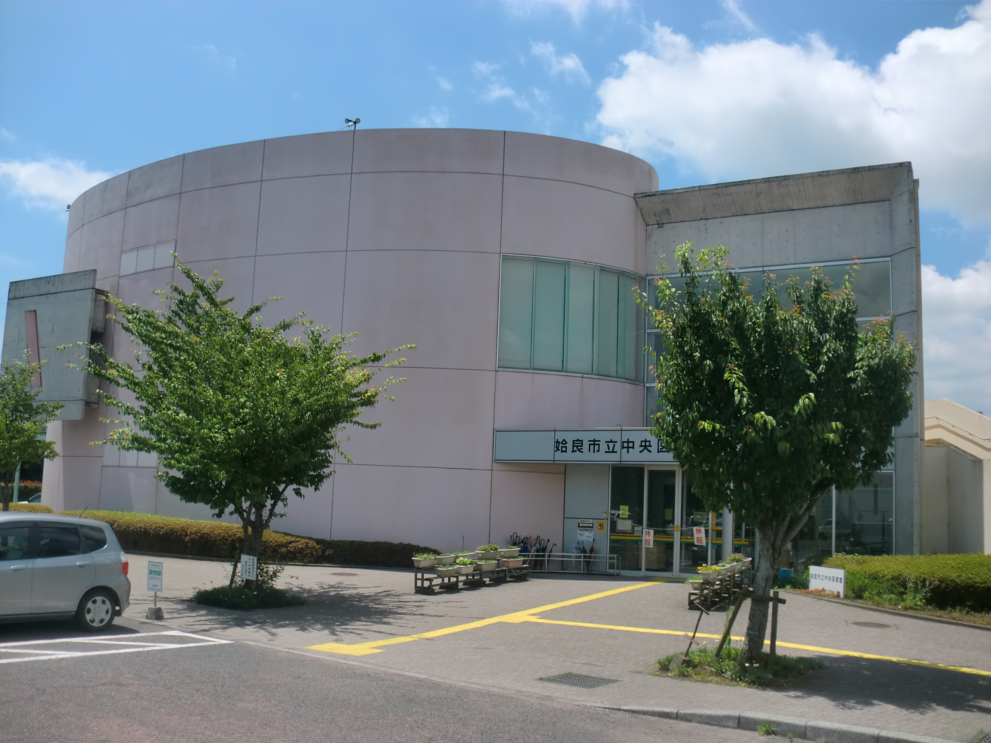 姶良市にある姶良市立中央図書館